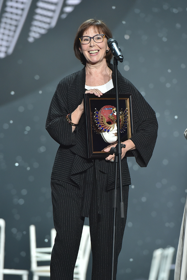 Евгения Симонова - Золотая маска 2017 года - лучшая актриса в драматическом театре. Актриса исполнила роль Софьи Андреевны Толстой в спектакле «Русский роман» Театра им.В. Маяковского